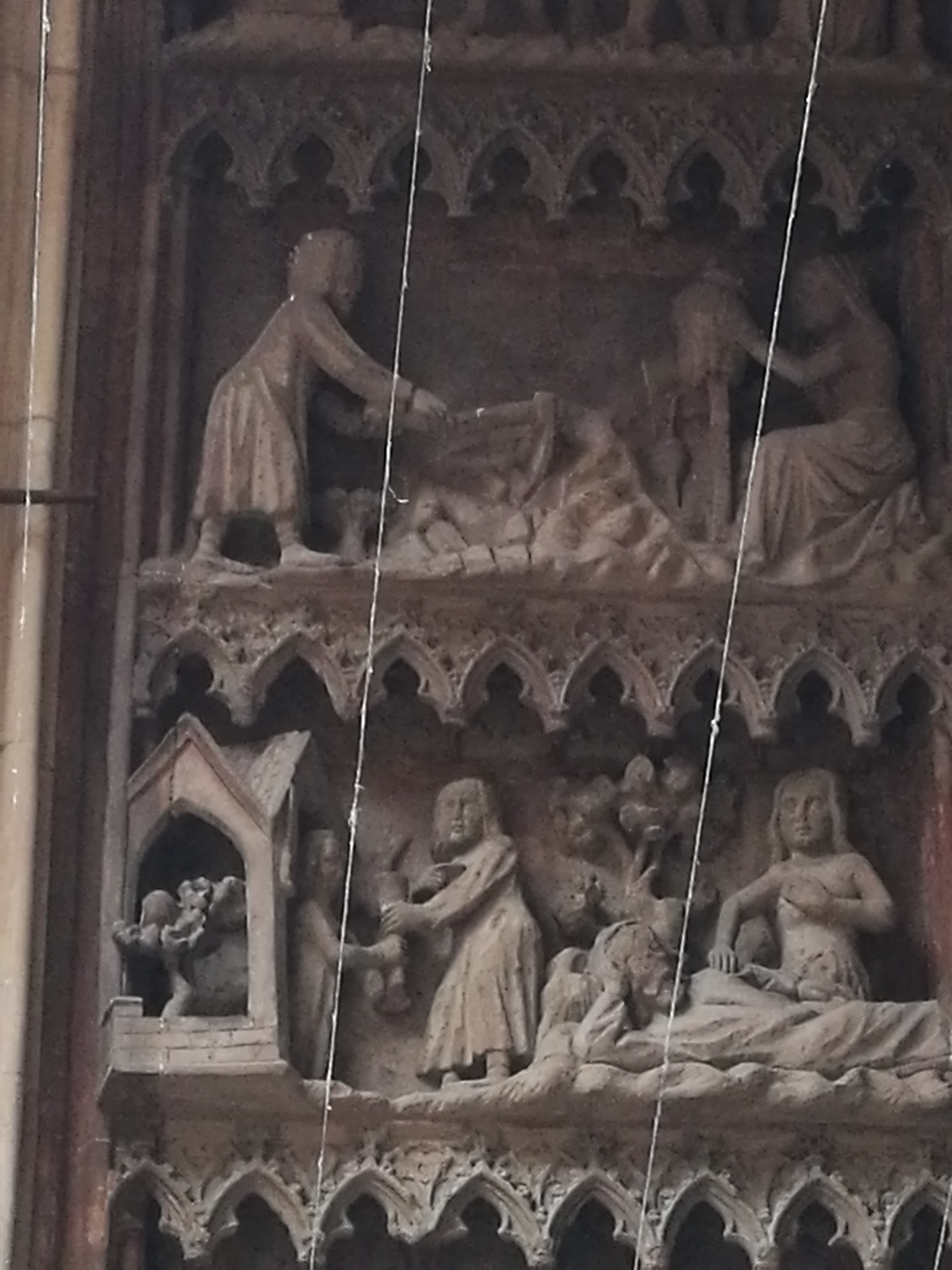 Plastik der Parlerepoche, alttestamentarische Szenen im Gewölbe.